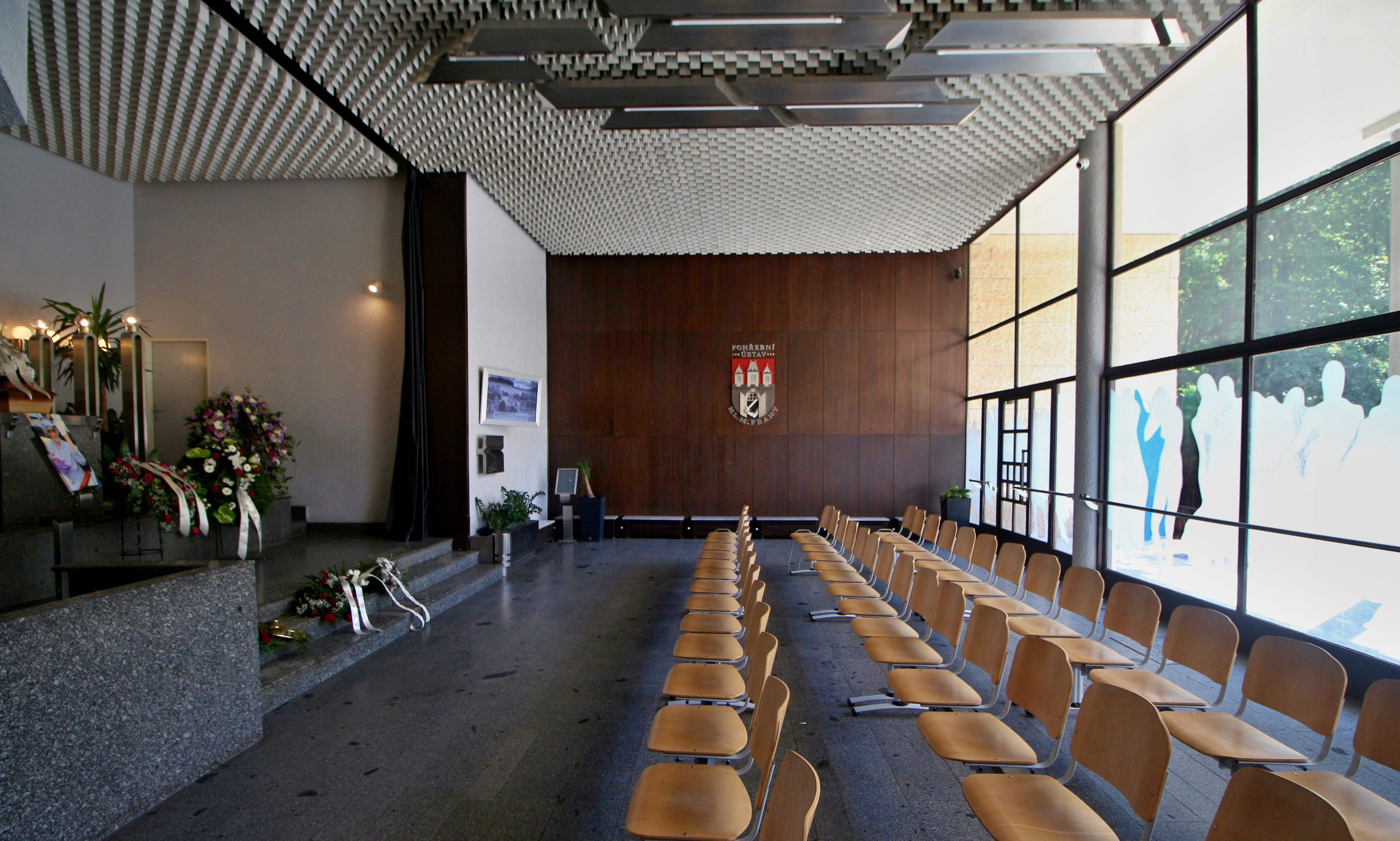 Hřbitov Praha-Motol